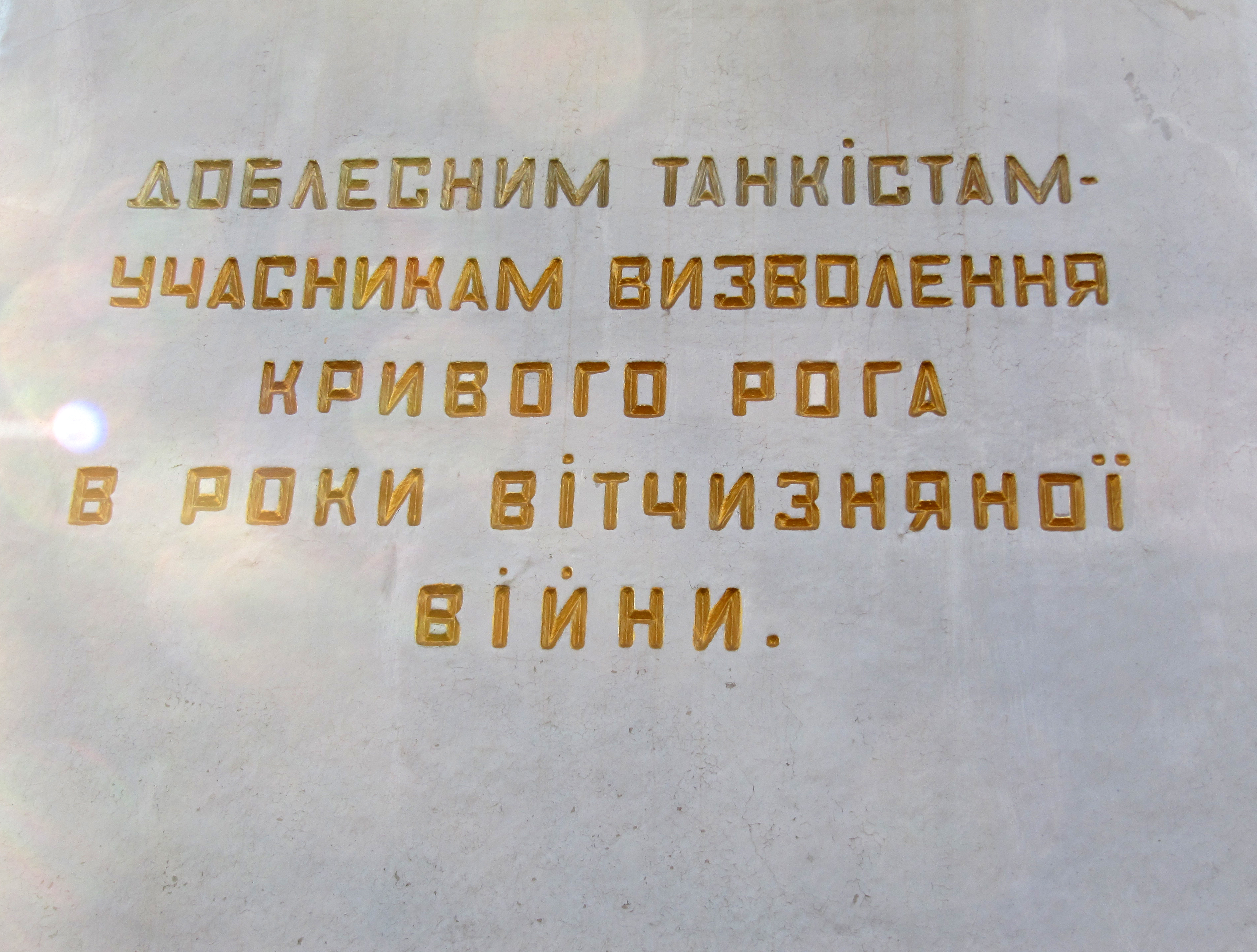 Меморіал «Танкістам – визволителям»